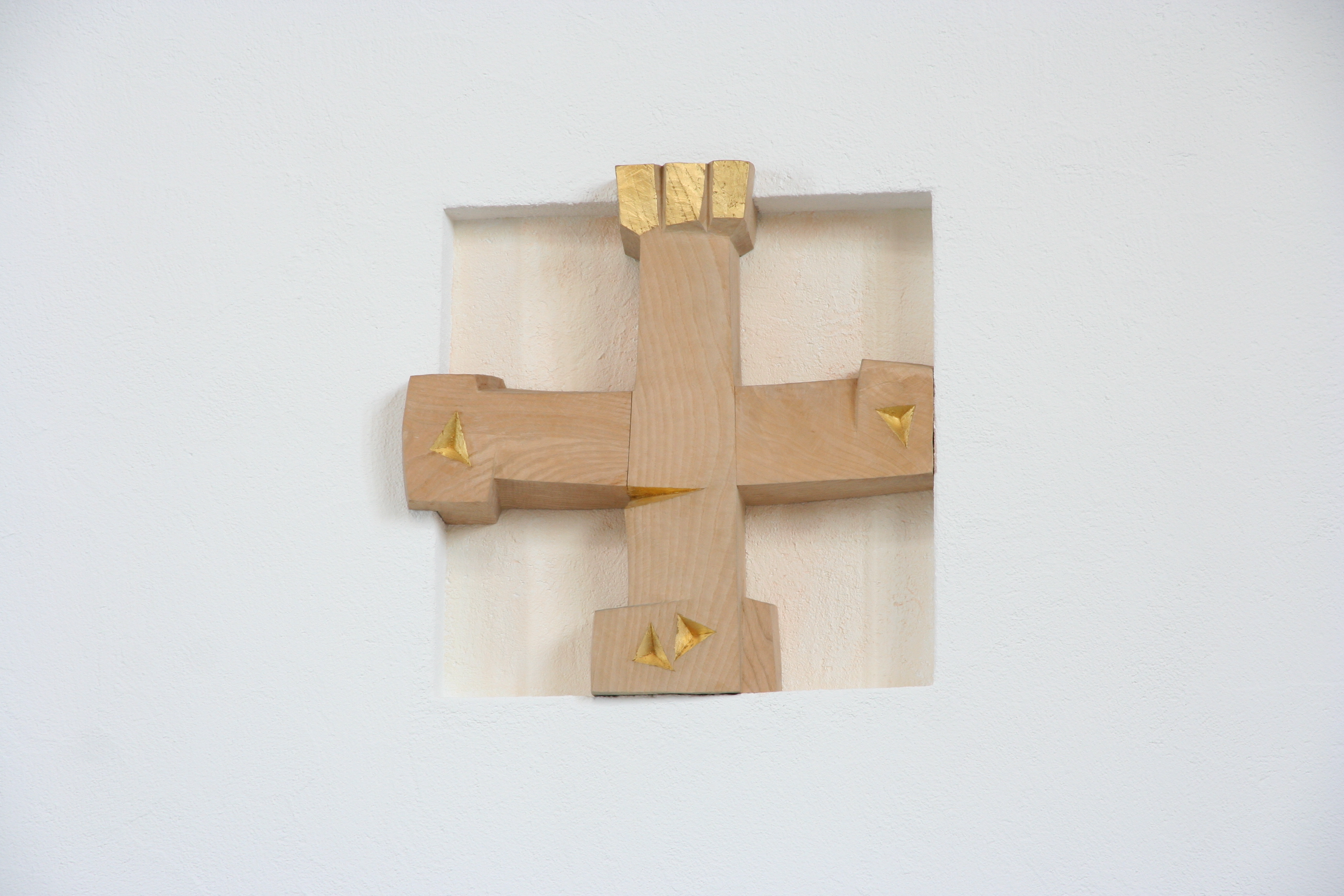 Römisch-katholische Pfarrkirche Maria Magdalena Rafz, Gestaltung von Alois Spichtig